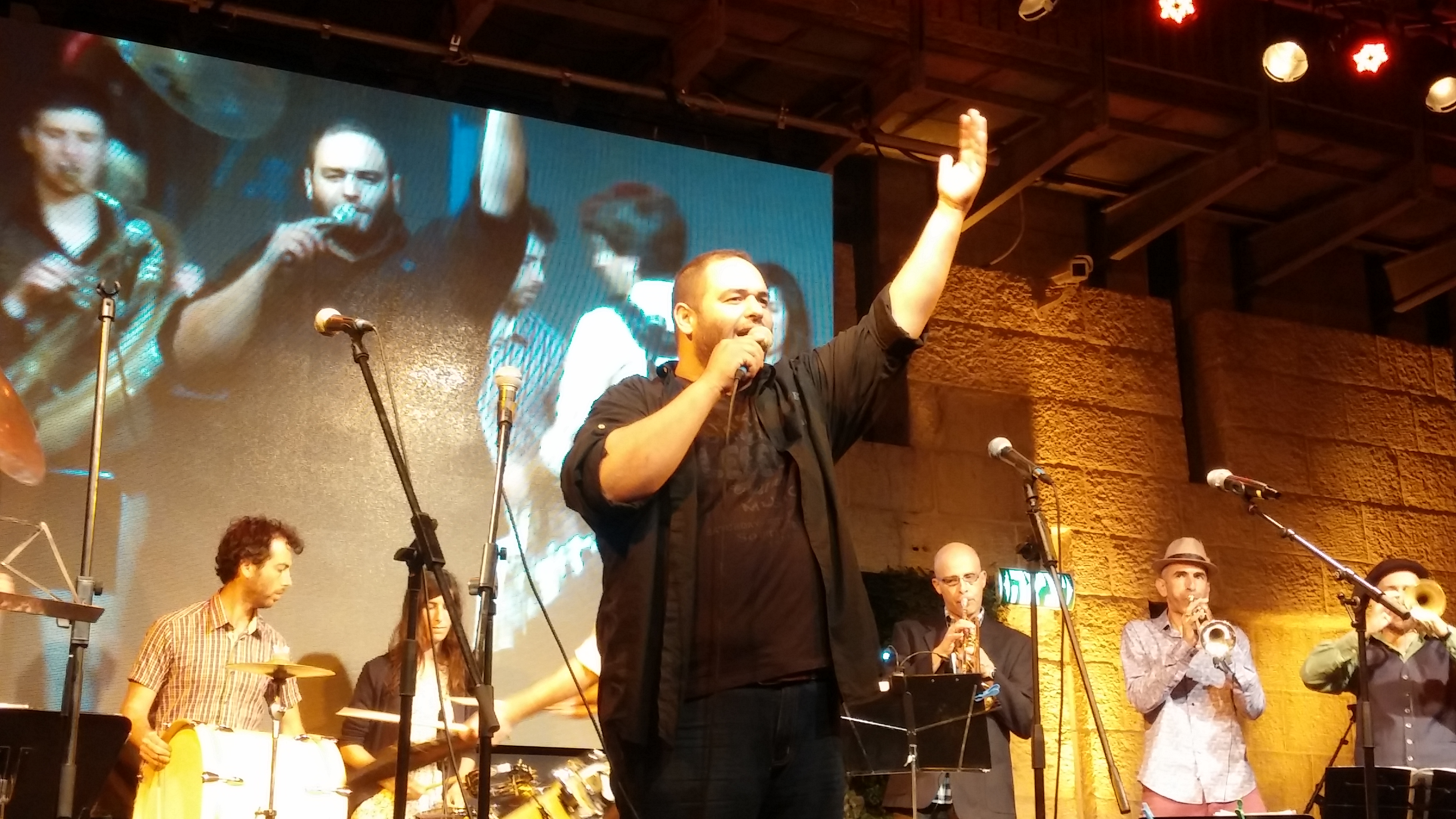 שי צברי בהופעה עם מארש דונדורמה, בית אבי חי, ירושלים, 21.5.2015